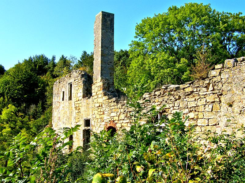 Klosterruine Ober-Werbe